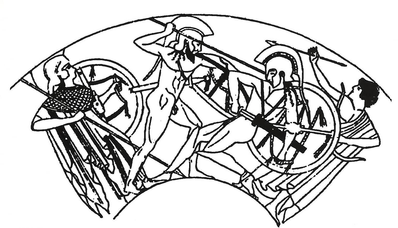 Griechische Vasendarstellung des Zweikampfs zwischen Achill und Hektor vor Troja.